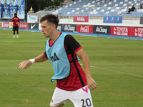 Mariano Berriex